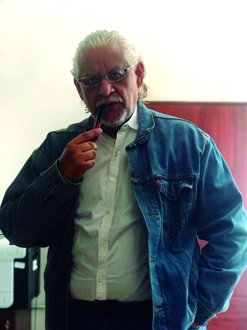 Foto de Ricardo Cantoral Uriza